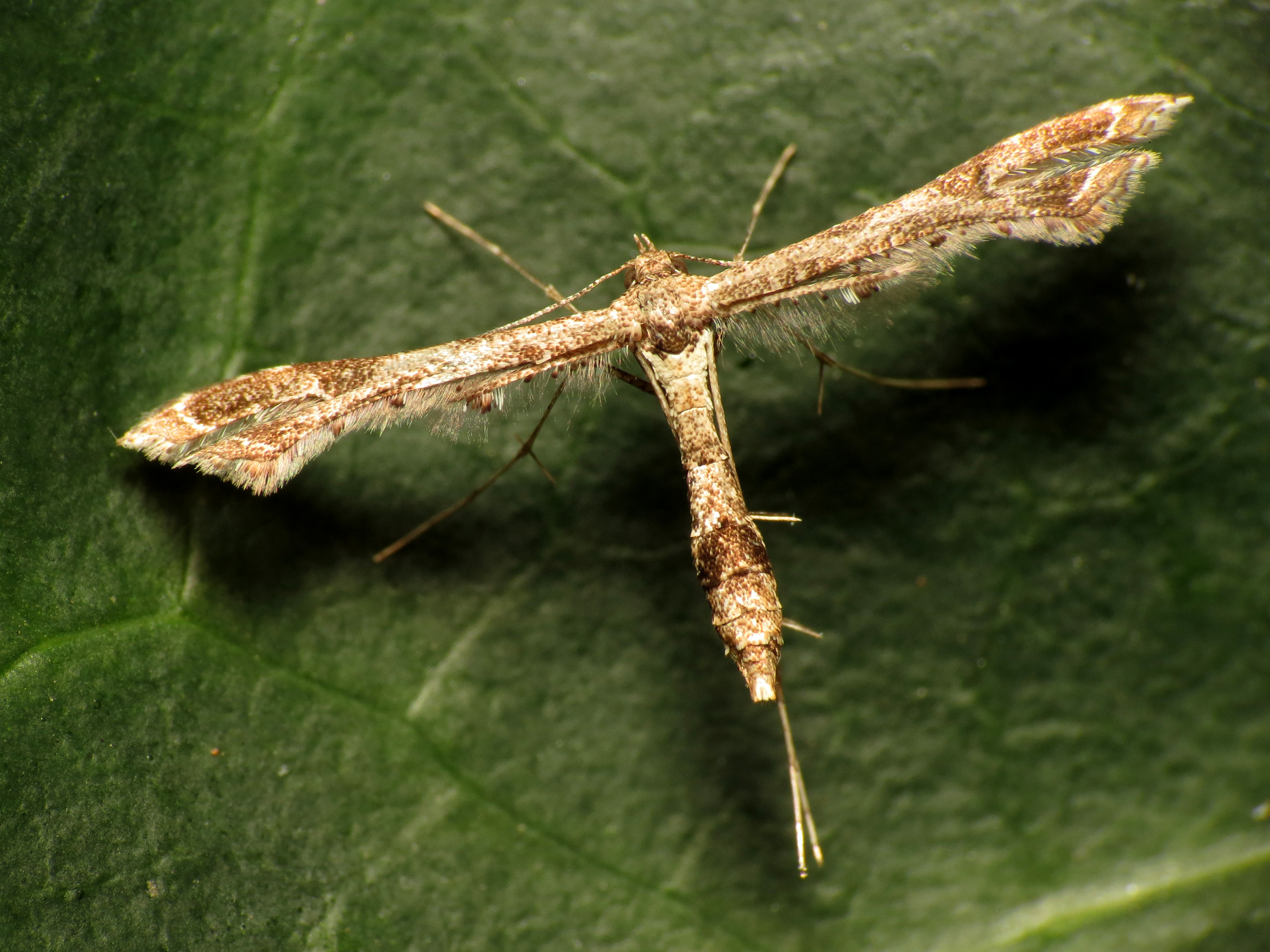 Lantanophaga pusillidactylus. Els Poblets, Comunidad Valenciana, Spain.